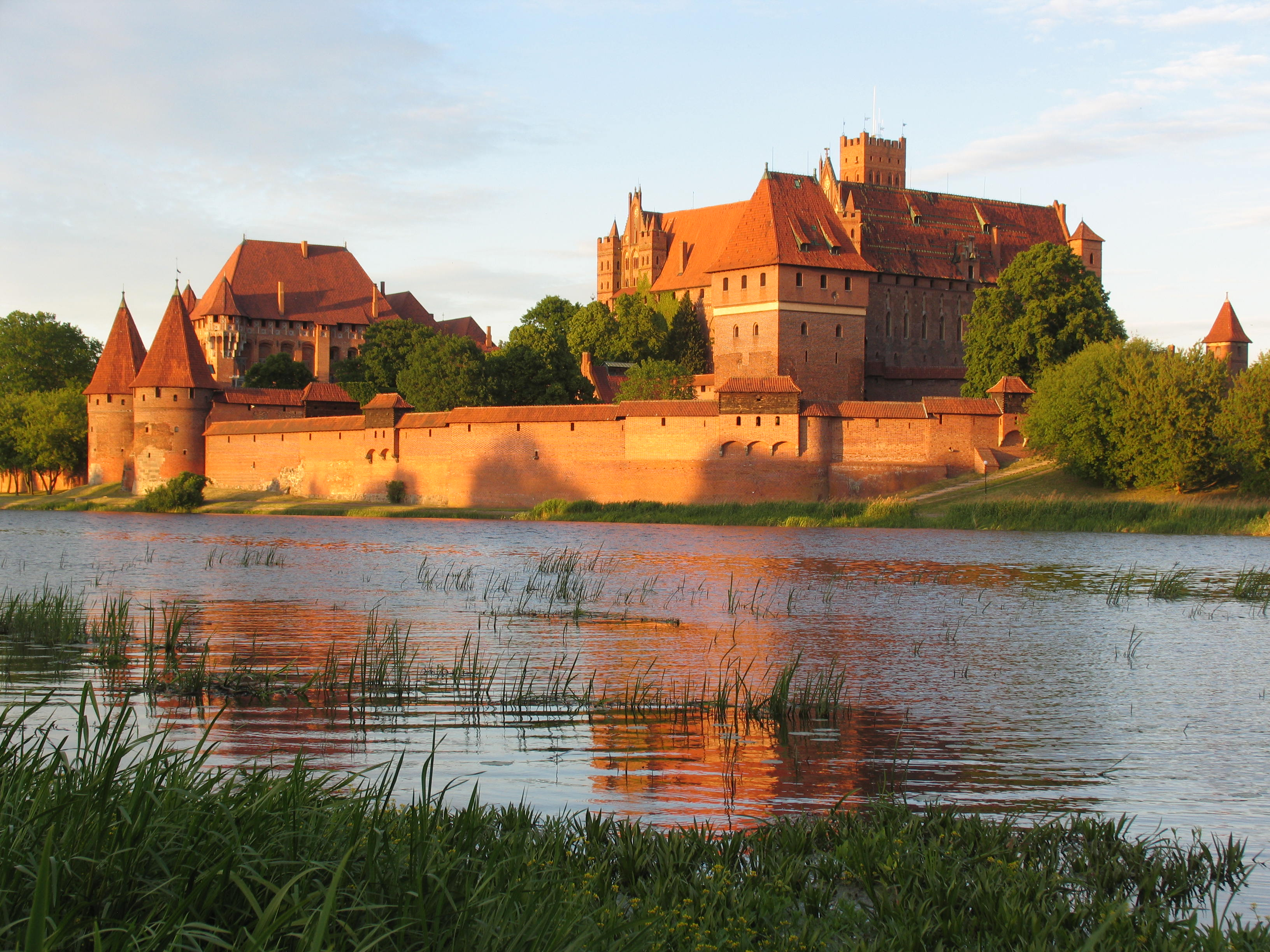 Malbork, zespół zamku krzyżackiego, XIII, XIX